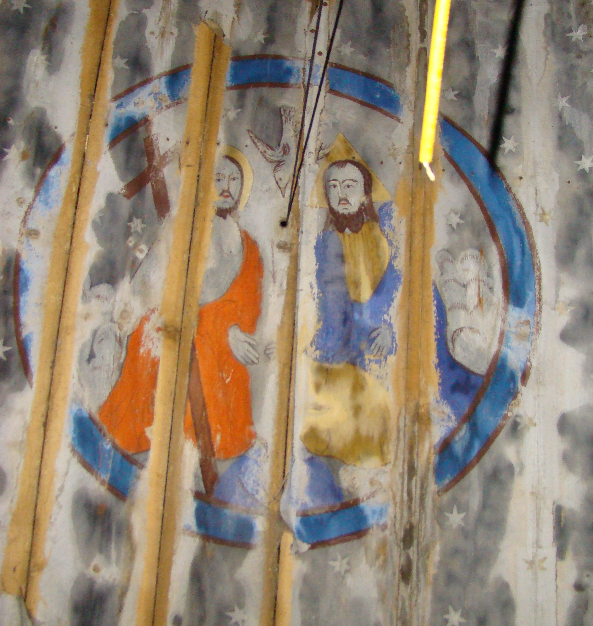 Biserica de lemn "Sfinții Împăraţi" din Aspra